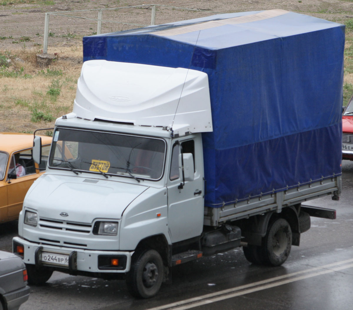 Фургон на базе автомобиля Бычок в Саратове